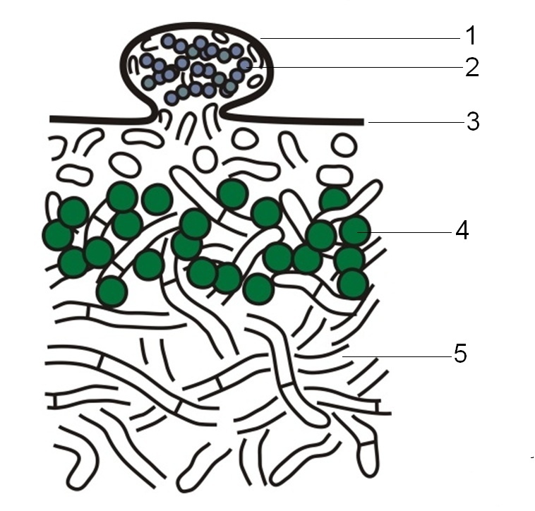 Cefalodium